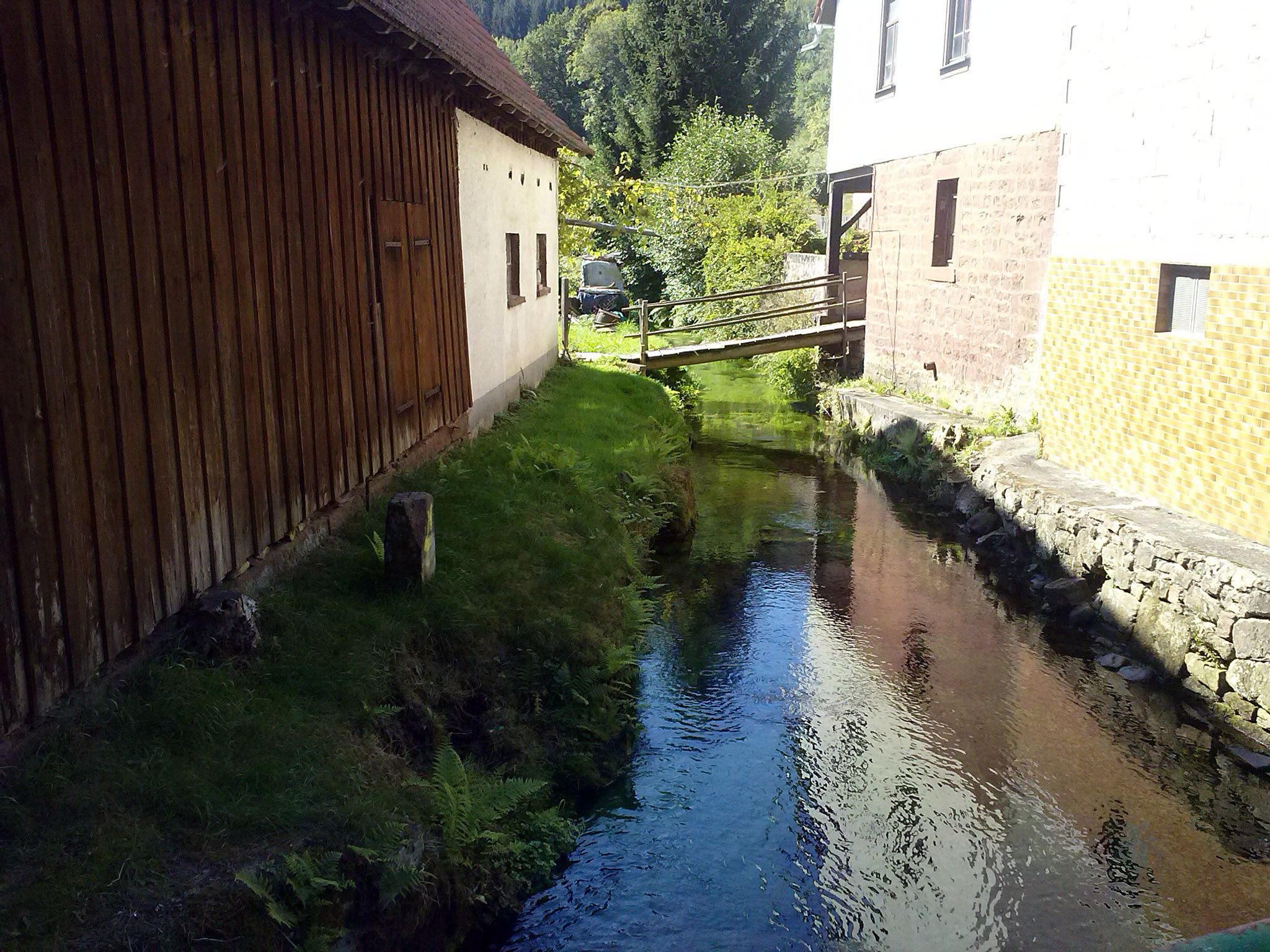 Die Itter bei Schöllenbach (Hessen). Die linke Seite des Ufers gehört zu Badisch Schöllenbach, das wiederum zur Gemeinde Eberbach und somit zu Baden-Württemberg gehört. Rechts liegt das hessische Schöllenbach. Ein Ortsteil von Hesseneck.